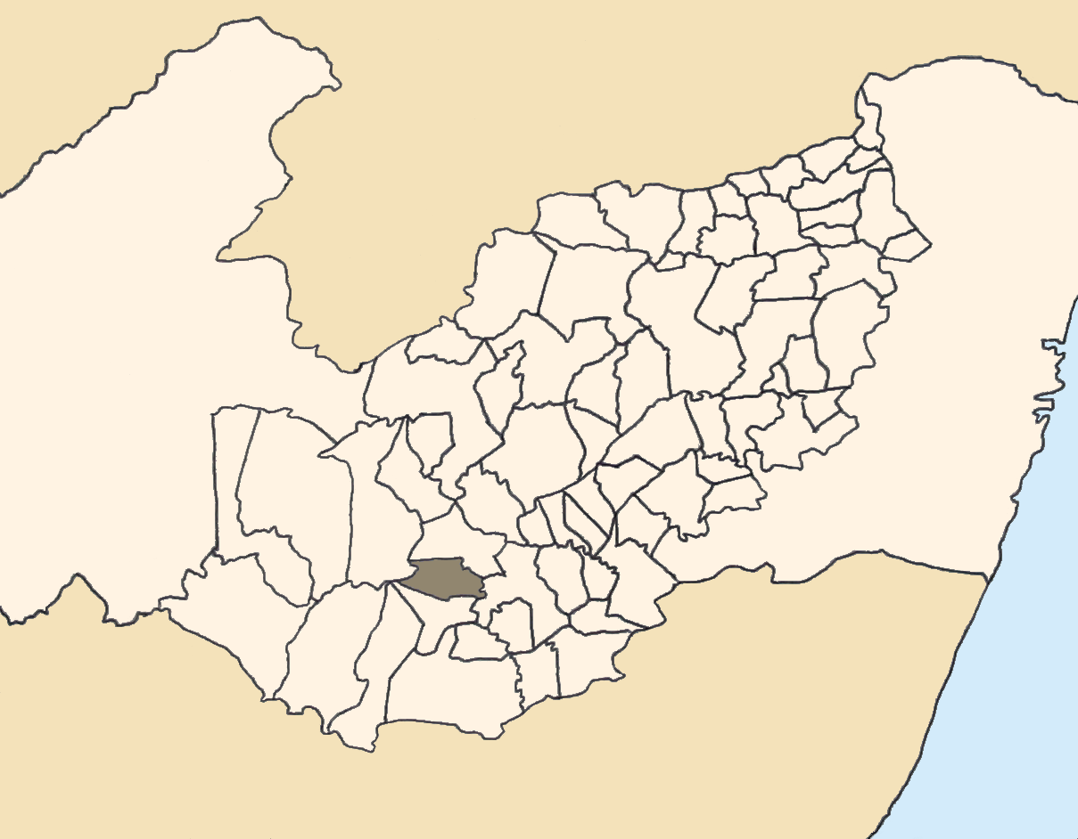 Mapa da mesorregião Agreste de Pernambuco (Brasil) subdivida em municípios. Em destaque, o município de Paranatama. Map of the brazilian state of Pernambuco (mesorregião Agreste) showing the city of Paranatama. Imagem tratada com o GIMP. Image made with GIMP.